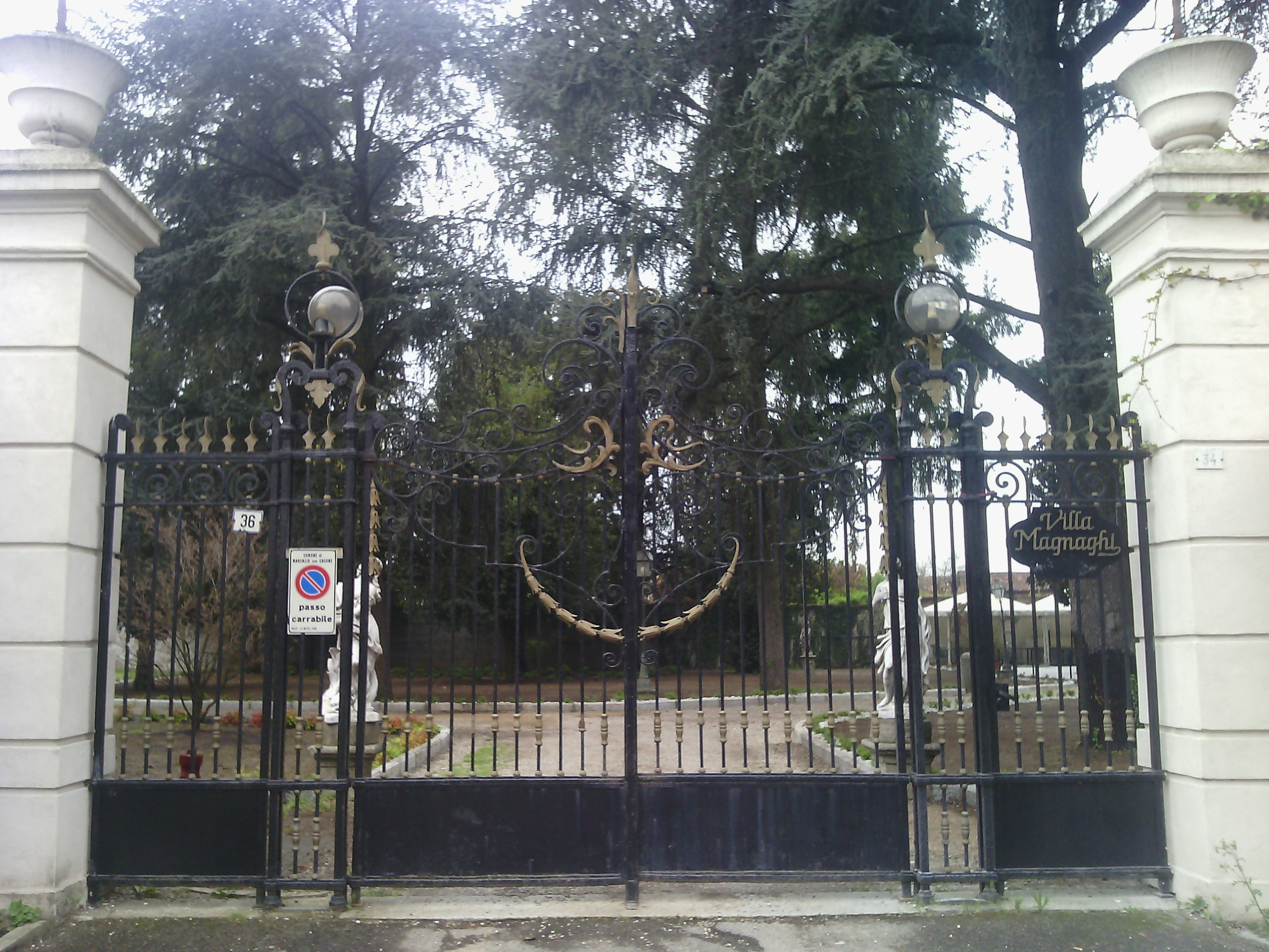 Cancello di Villa Magnaghi a Marcallo con Casone (MI) - Italy